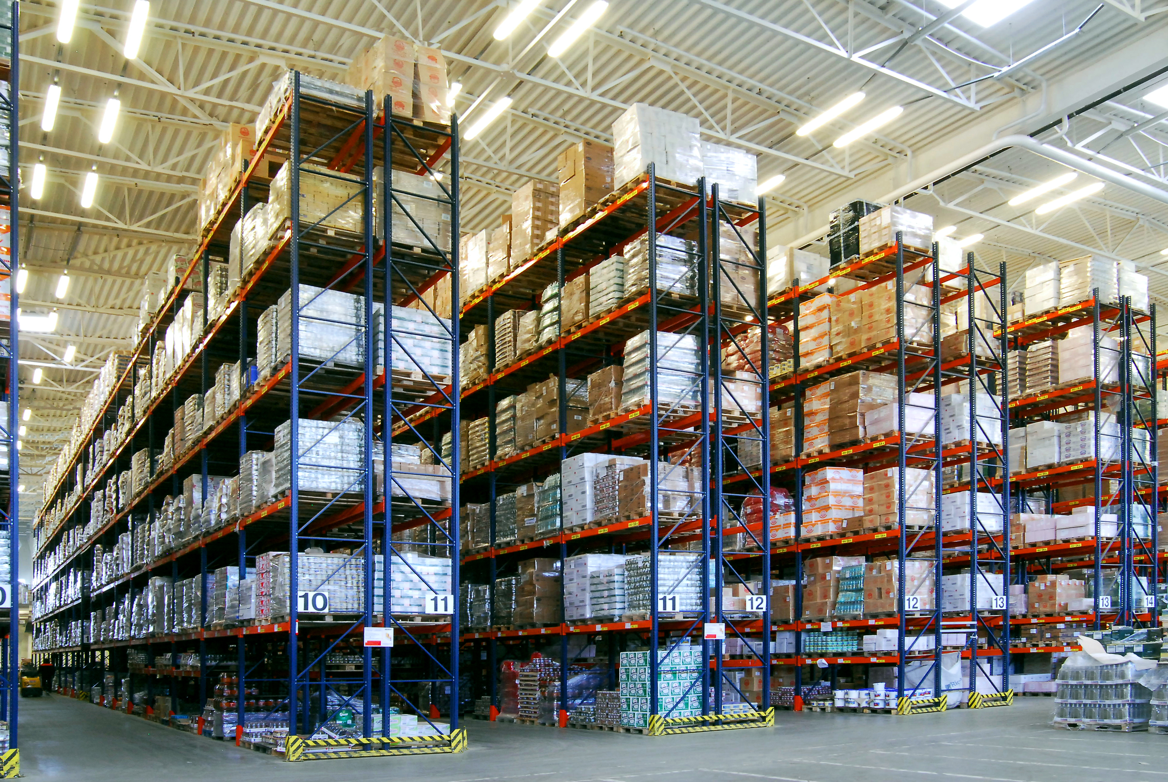 паллетный стеллаж